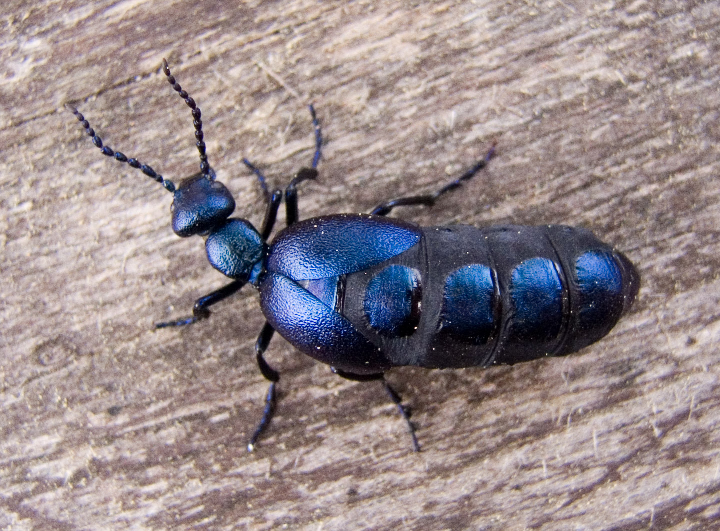 Meloe proscarabaeus Paprastasis gegužvabalis